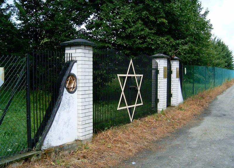 Brama żydowskiego cmentarza w Pilźnie.